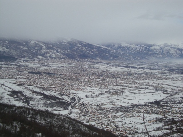 Gostivar